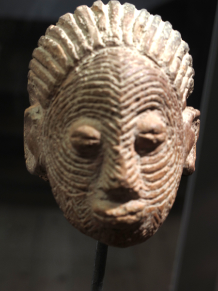 Tête en terre cuite Sao. Woutio, Cameroun. Don de l'administrateur Gatau, en 1949. Muséum d'histoire naturelle de La Rochelle. H. 1982